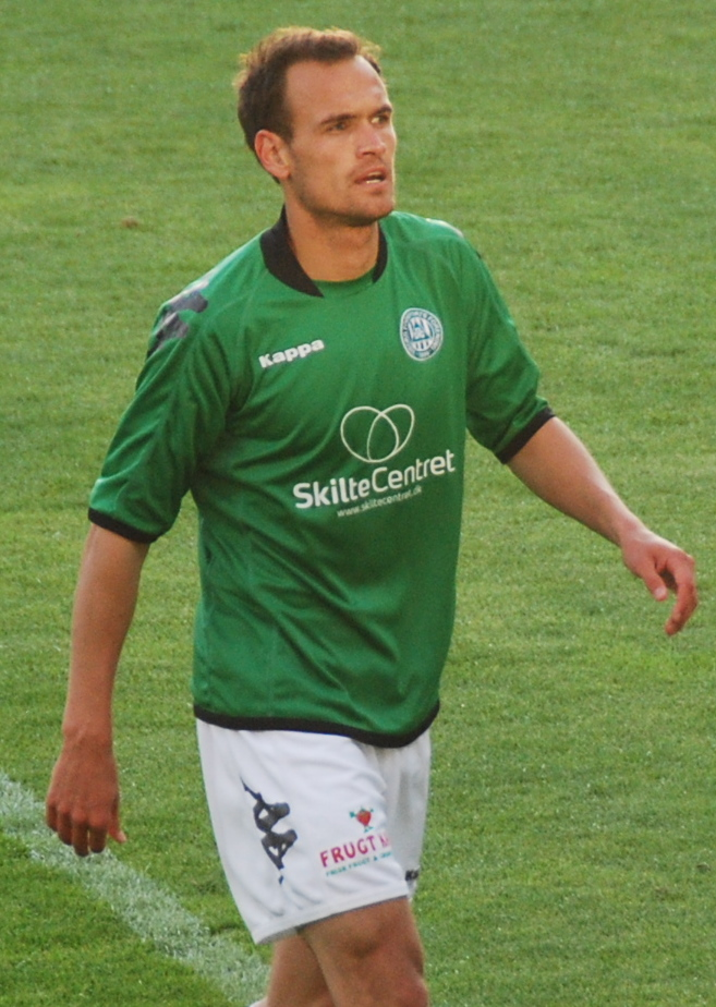 Fodboldspilleren Mikkel Rask fra Viborg FF. Her i 1. divisionskampen mod Kolding FC på Viborg Stadion.